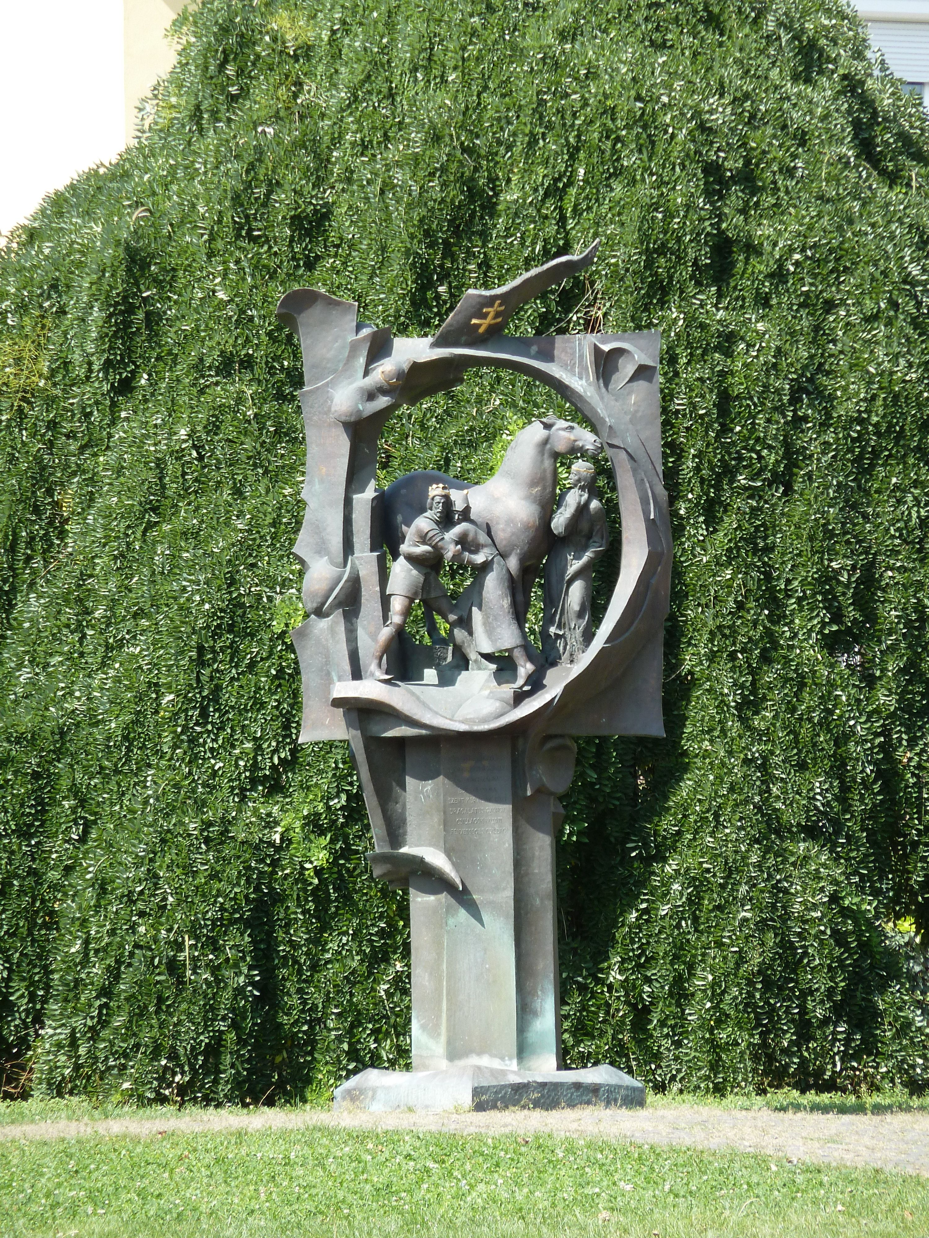 Szent László szobra, Nagy Benedek alkotása, 2001, ivókút is.- A Béla téren, Szekszárd